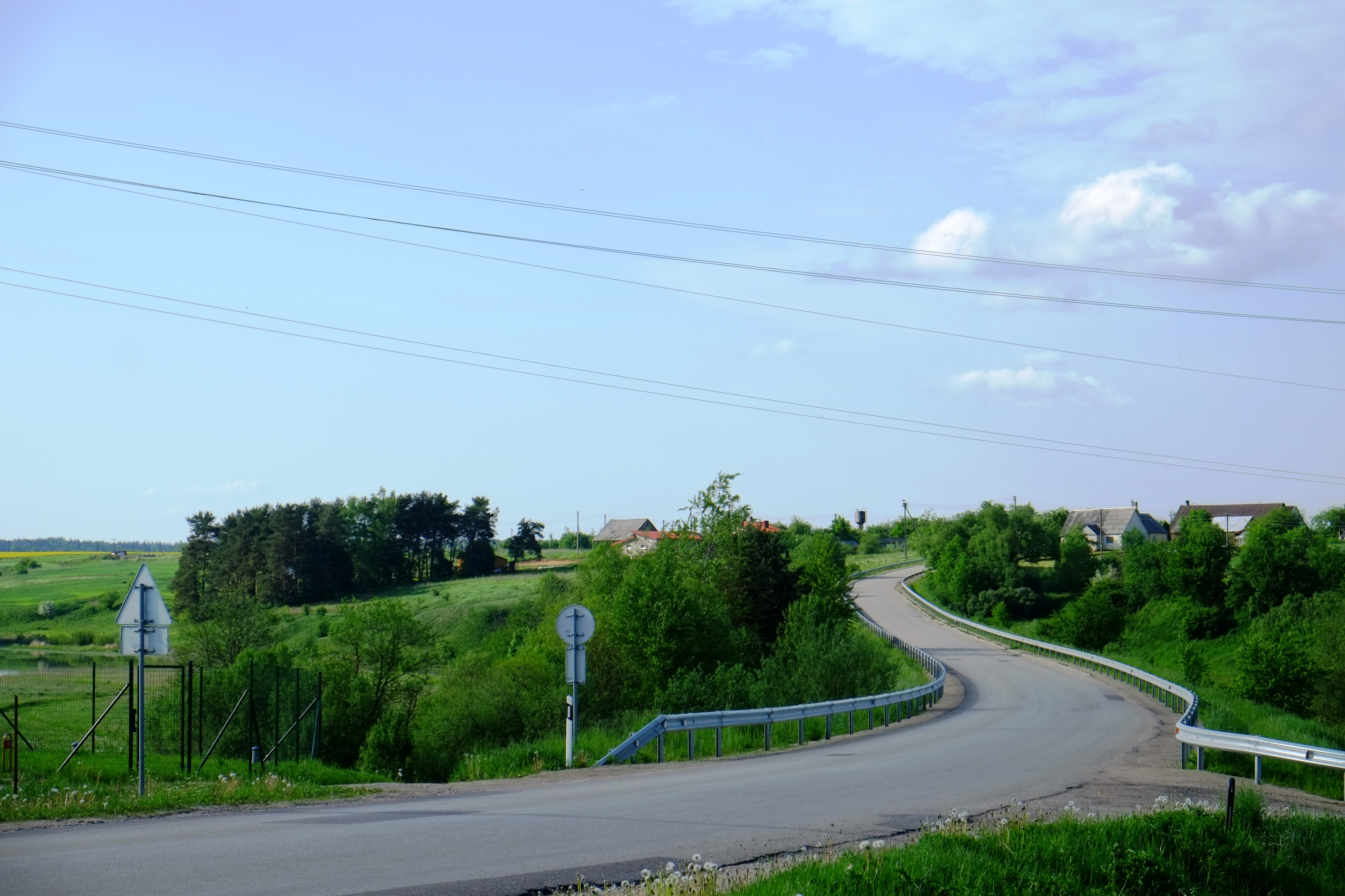 Alesninkai, Elektrėnų sav.